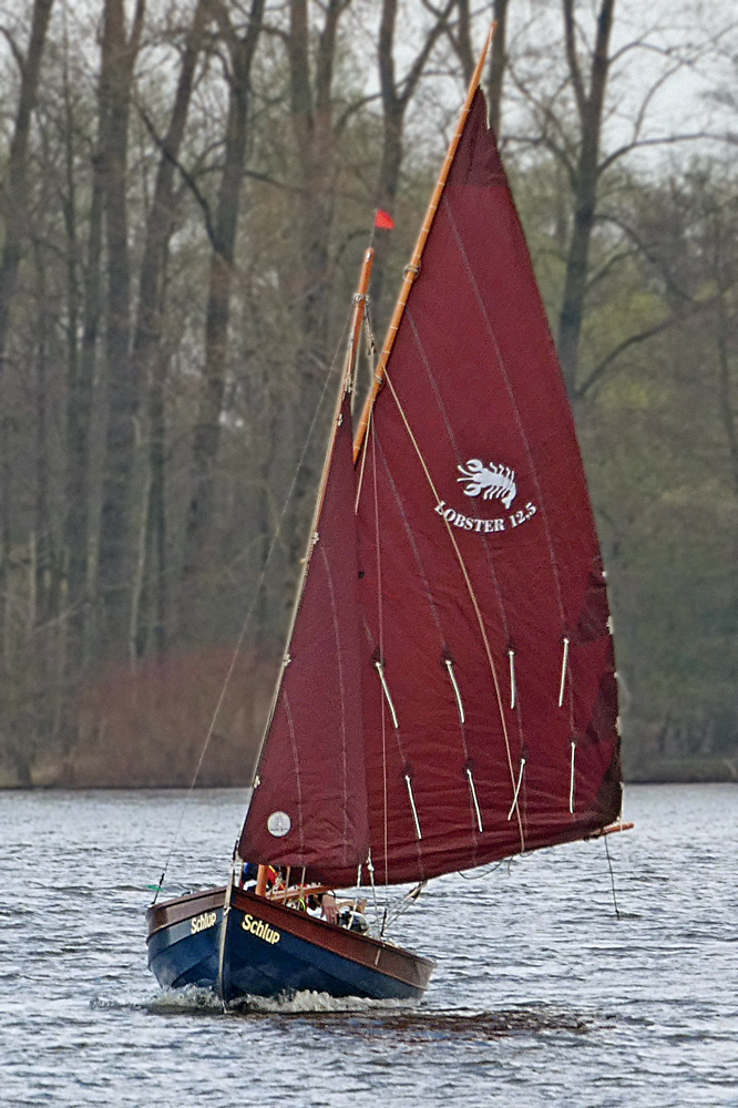 Lobster 12.5 frontal